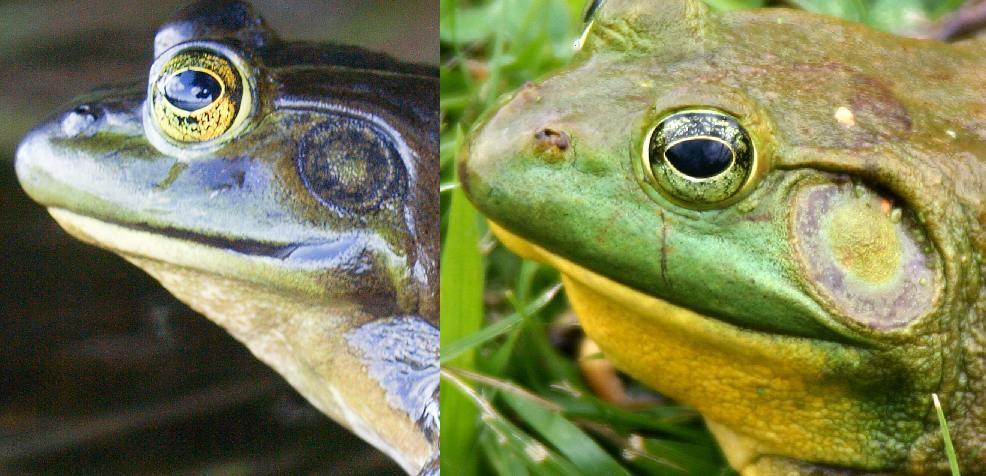 Composition of two files: File:North-American-bullfrog1.jpg File:File:American bullfrog.jpg